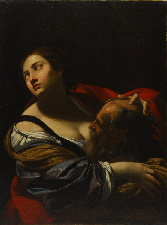 Le tableau de Simon Vouet